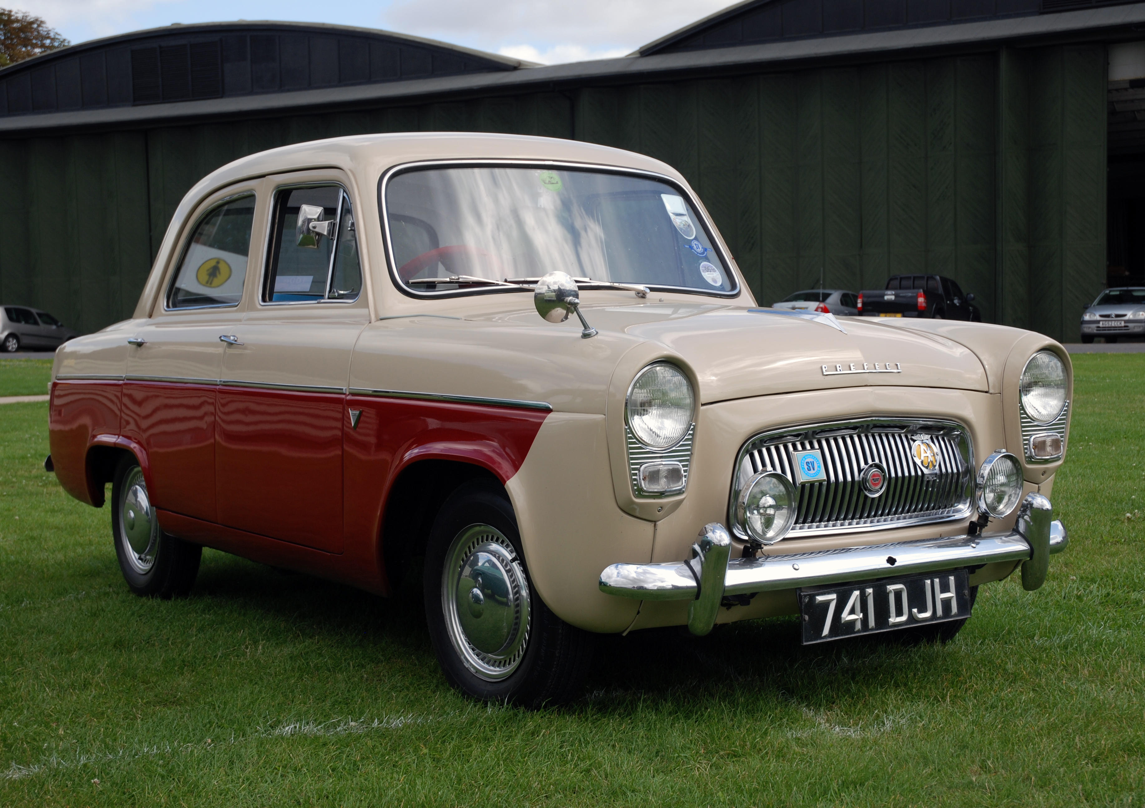 Duxford,Aug 2009